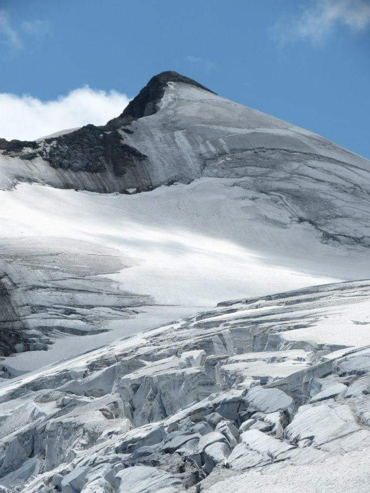 Rainerhorn